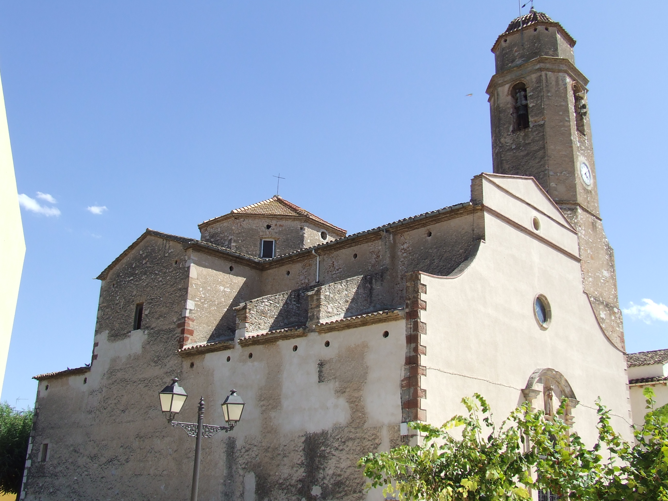 Església parroquial de Sant Lluís dels Guiamets. Començada el 1791